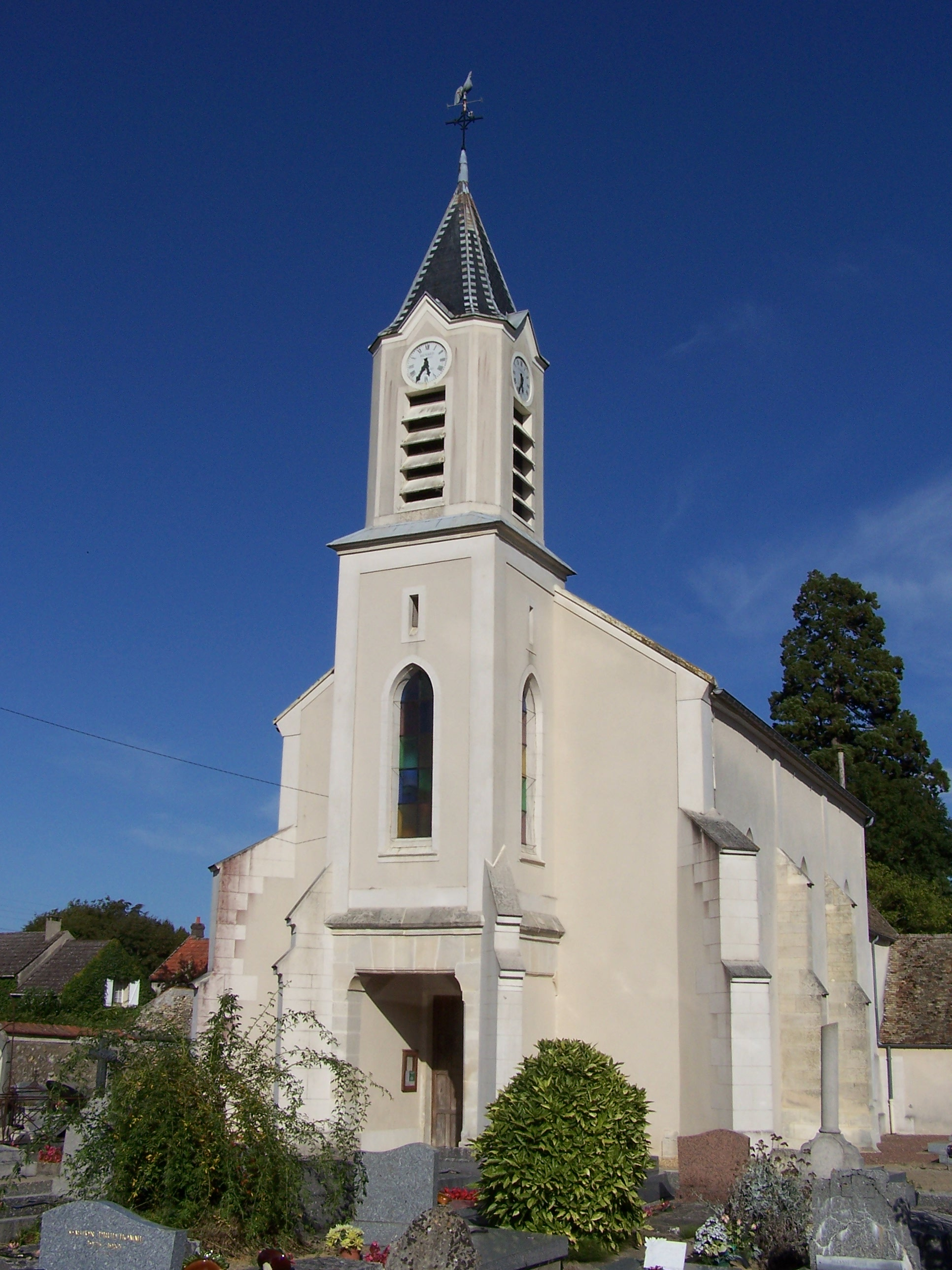 Église d'Auteuil (Yvelines, France)